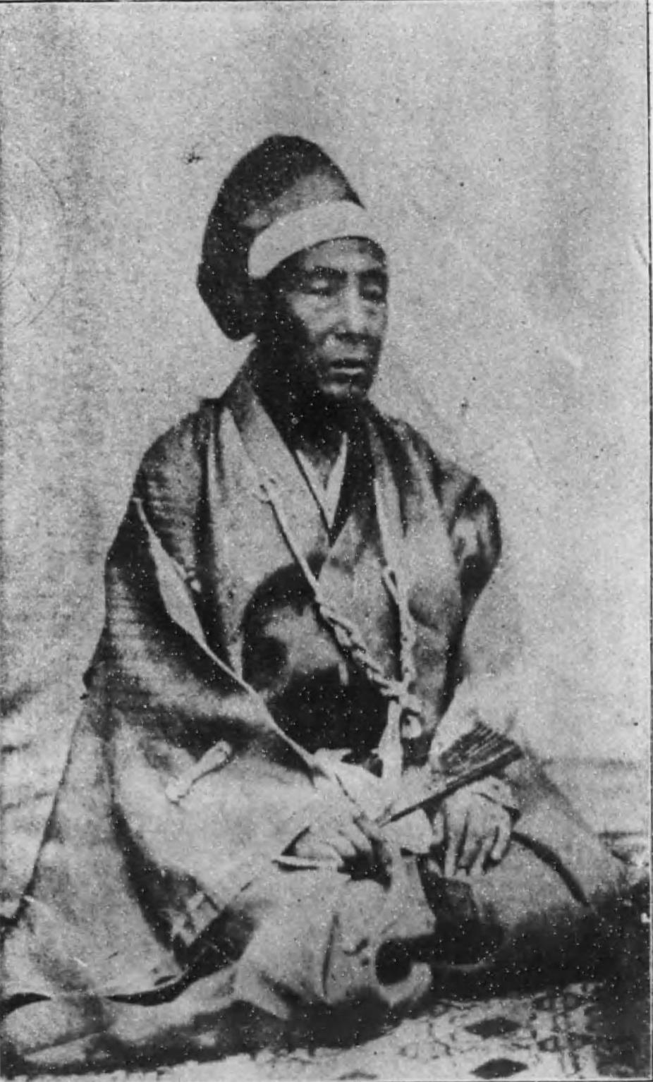 村上範致写真